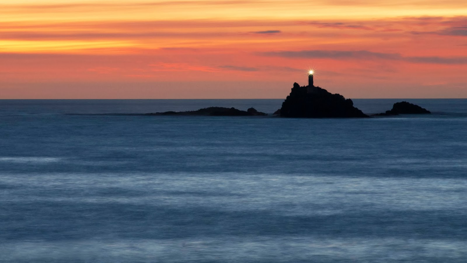 Les Formigues, des de Cala Estreta This is a a photo of a natural area in Catalonia, Spain, with id: ES510239